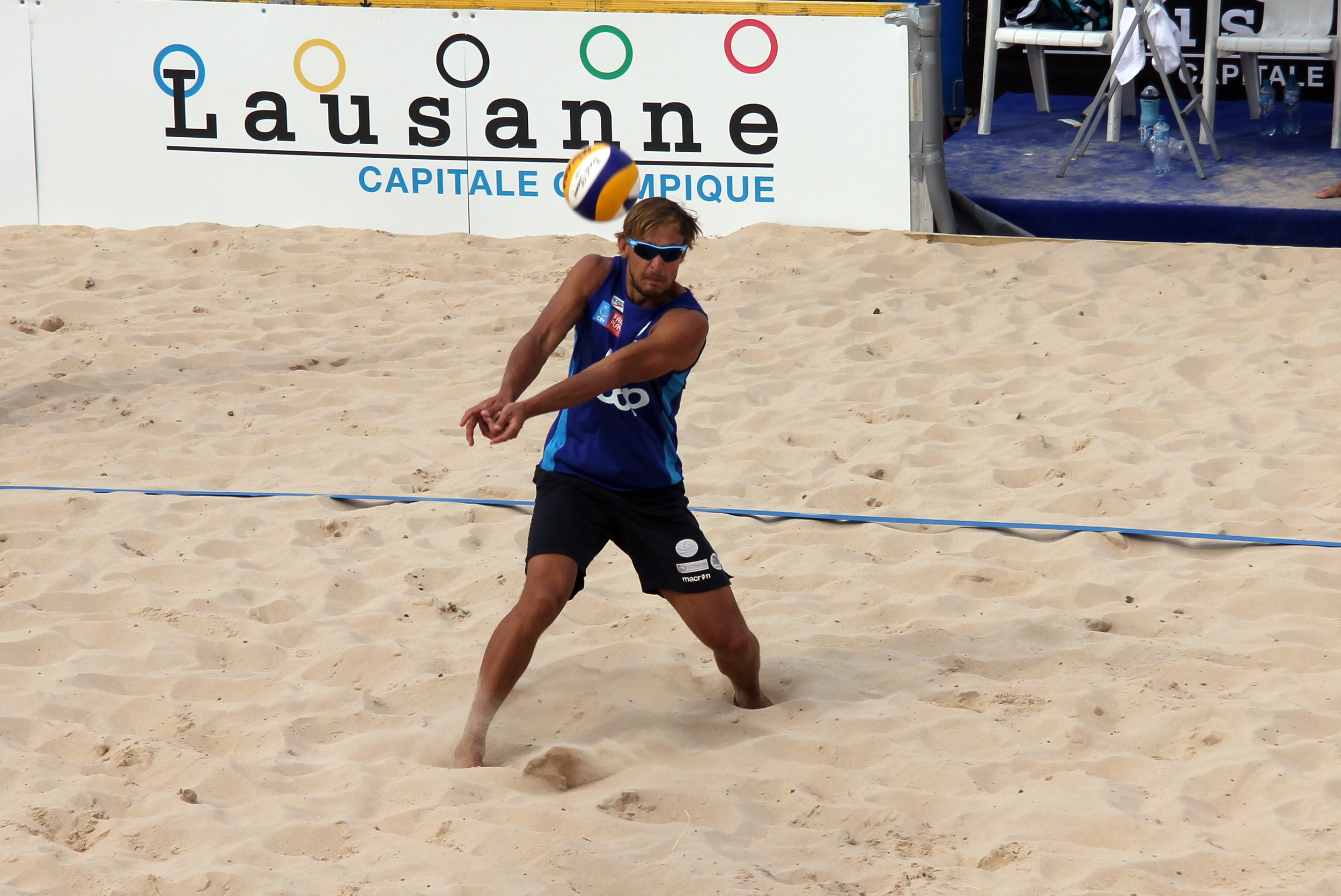 Ruslans Sorokins.